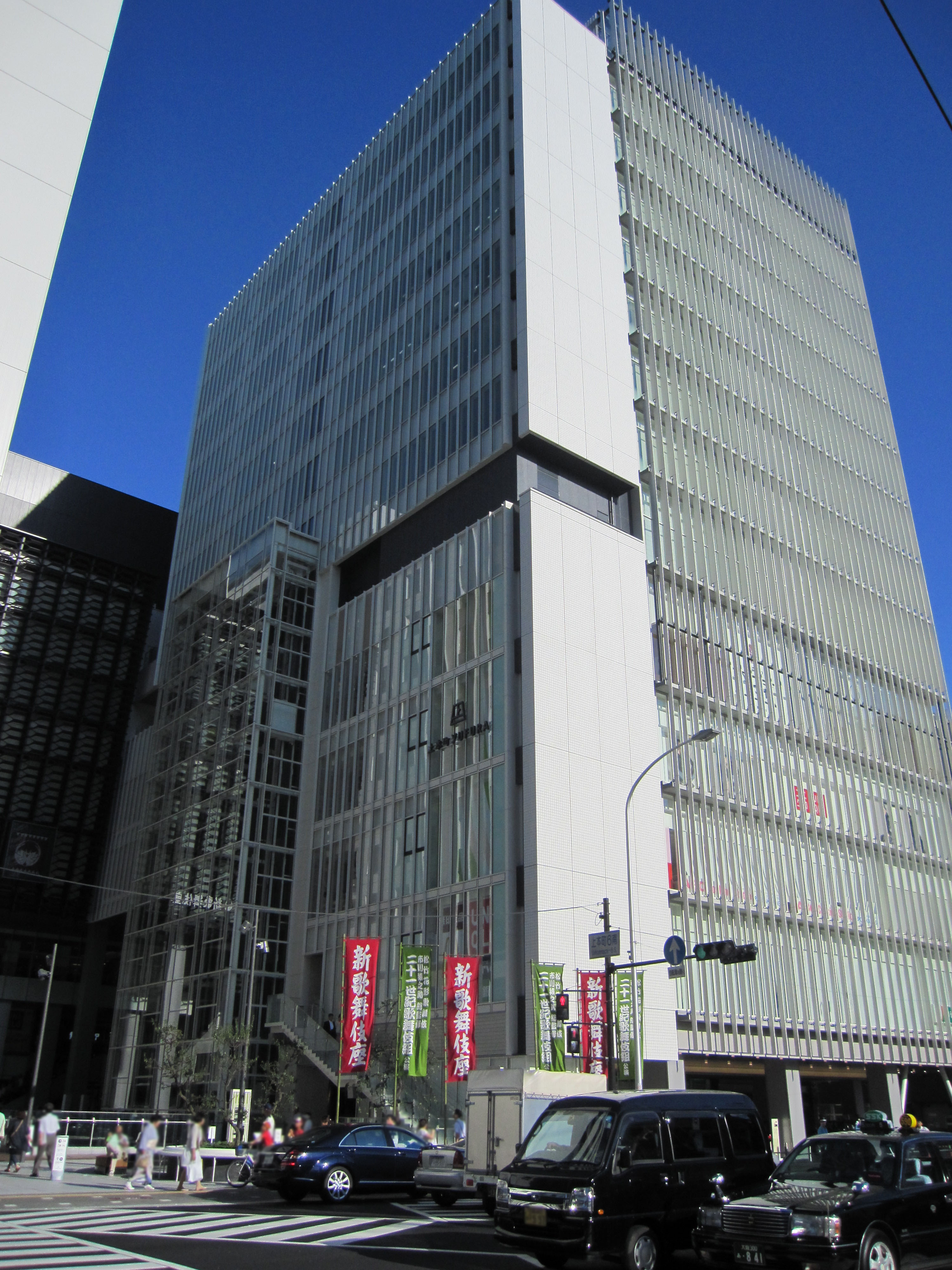 上本町YUFURAを6丁目南交差点から撮影。